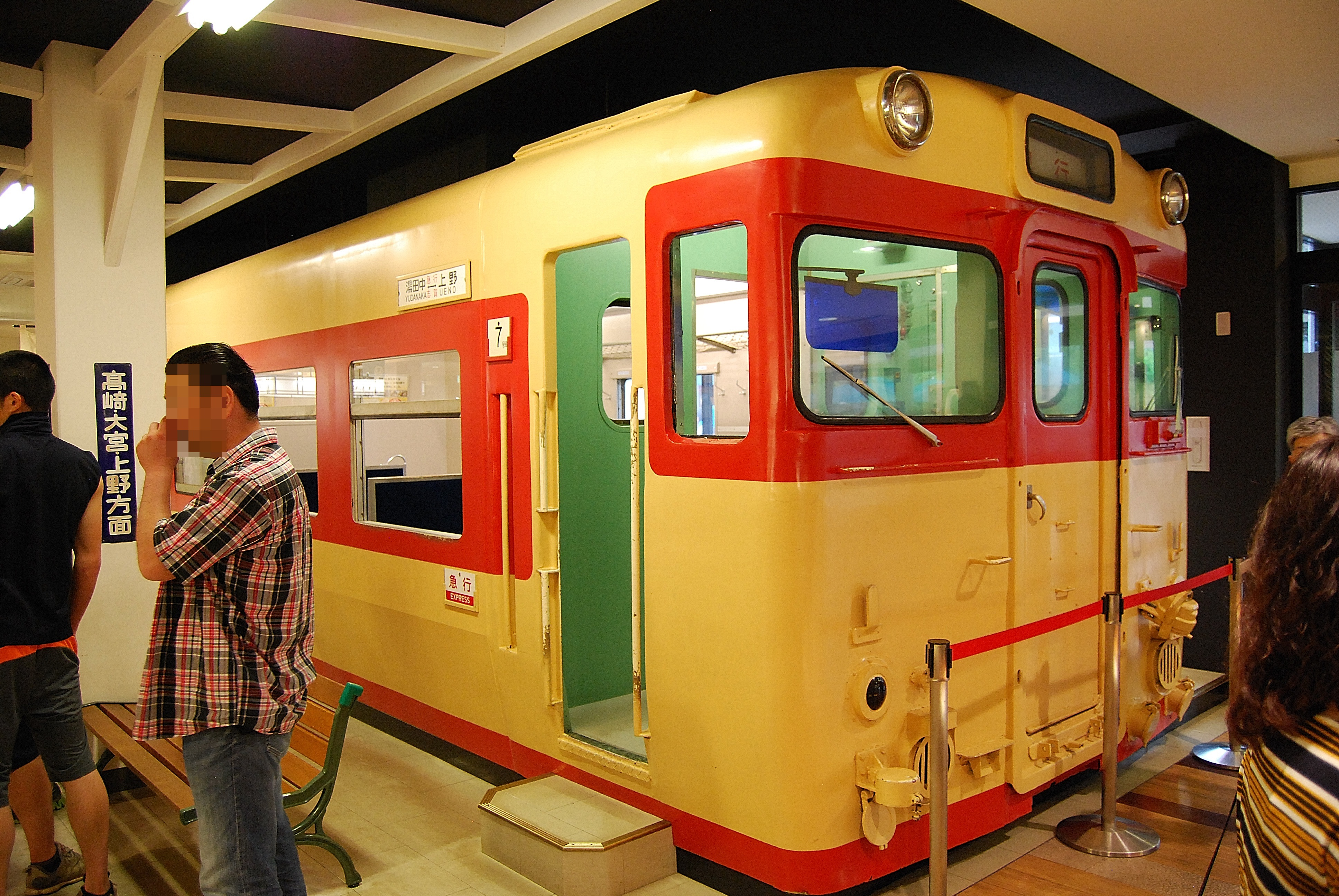 上信越自動車道横川サービスエリア上り線のメモリアルコーナーに保存されている、キハ58 624の運転台部分と接合した客室部モックアップ。